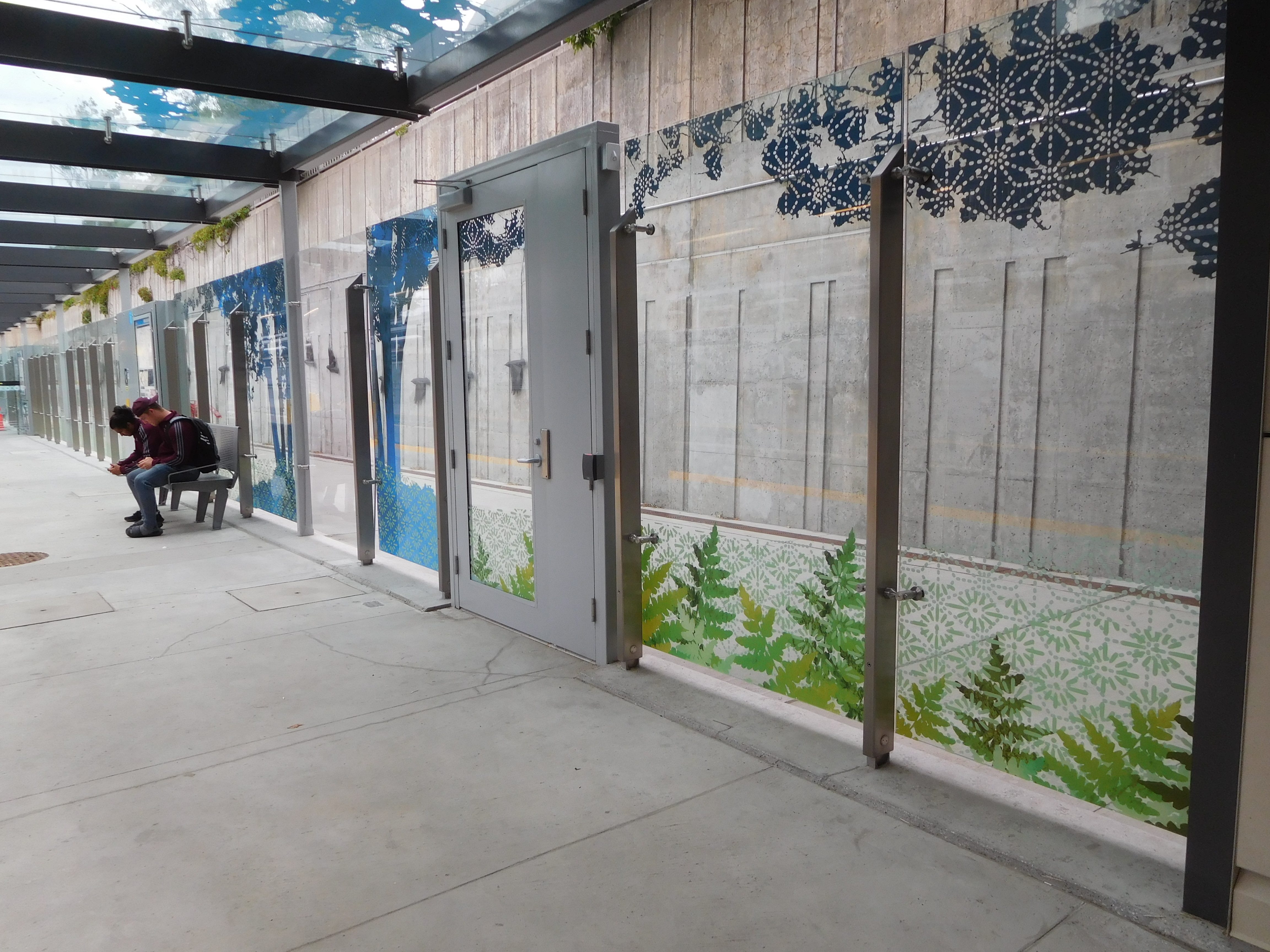 Station Lees de la ligne de la Confédération à Ottawa